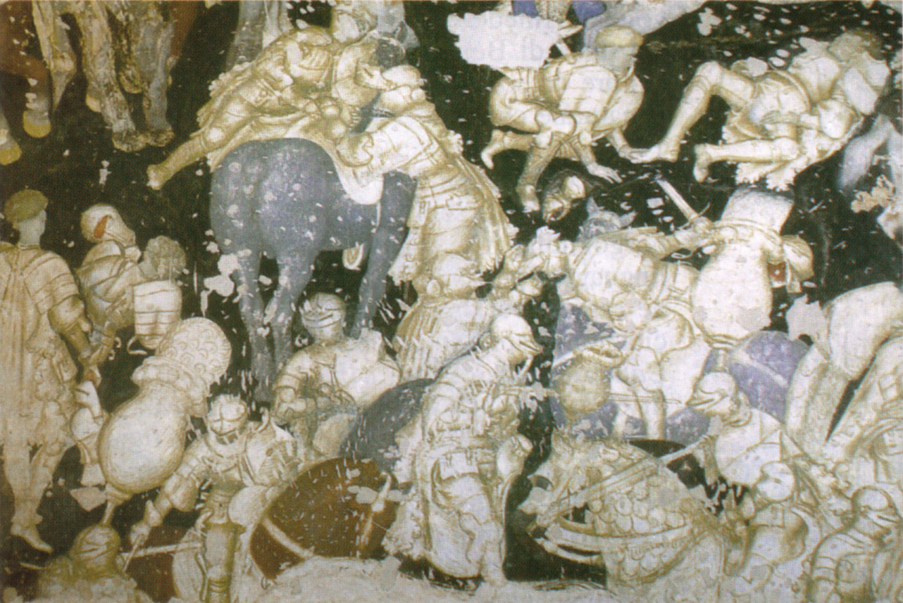 Pisanello, torneo-battaglia di liuverzep 01.1.jpg